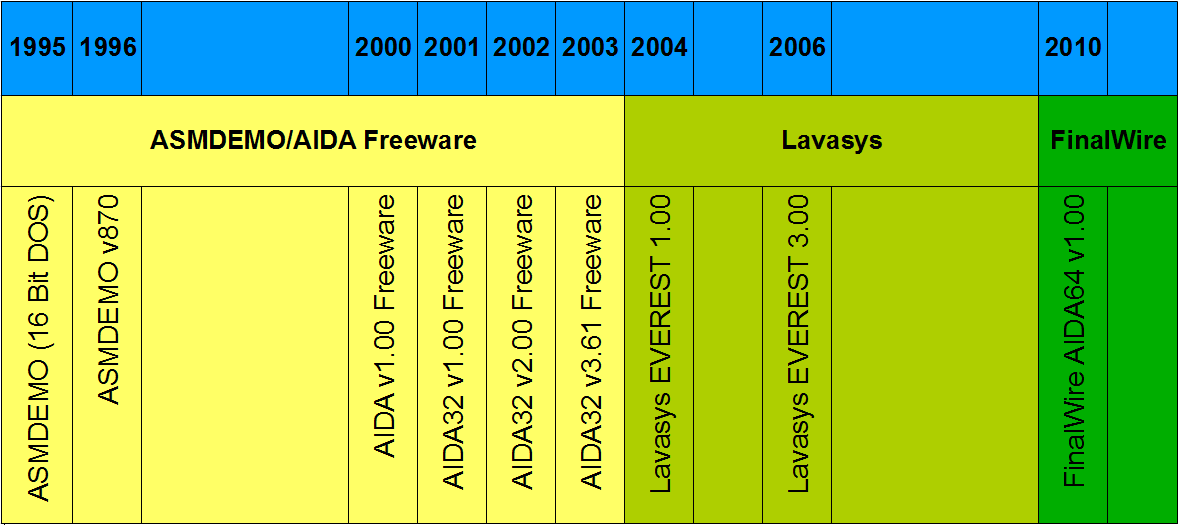 Zeitleiste der Entwicklung des Programms AIDA. Unter Verwendung der Angaben von